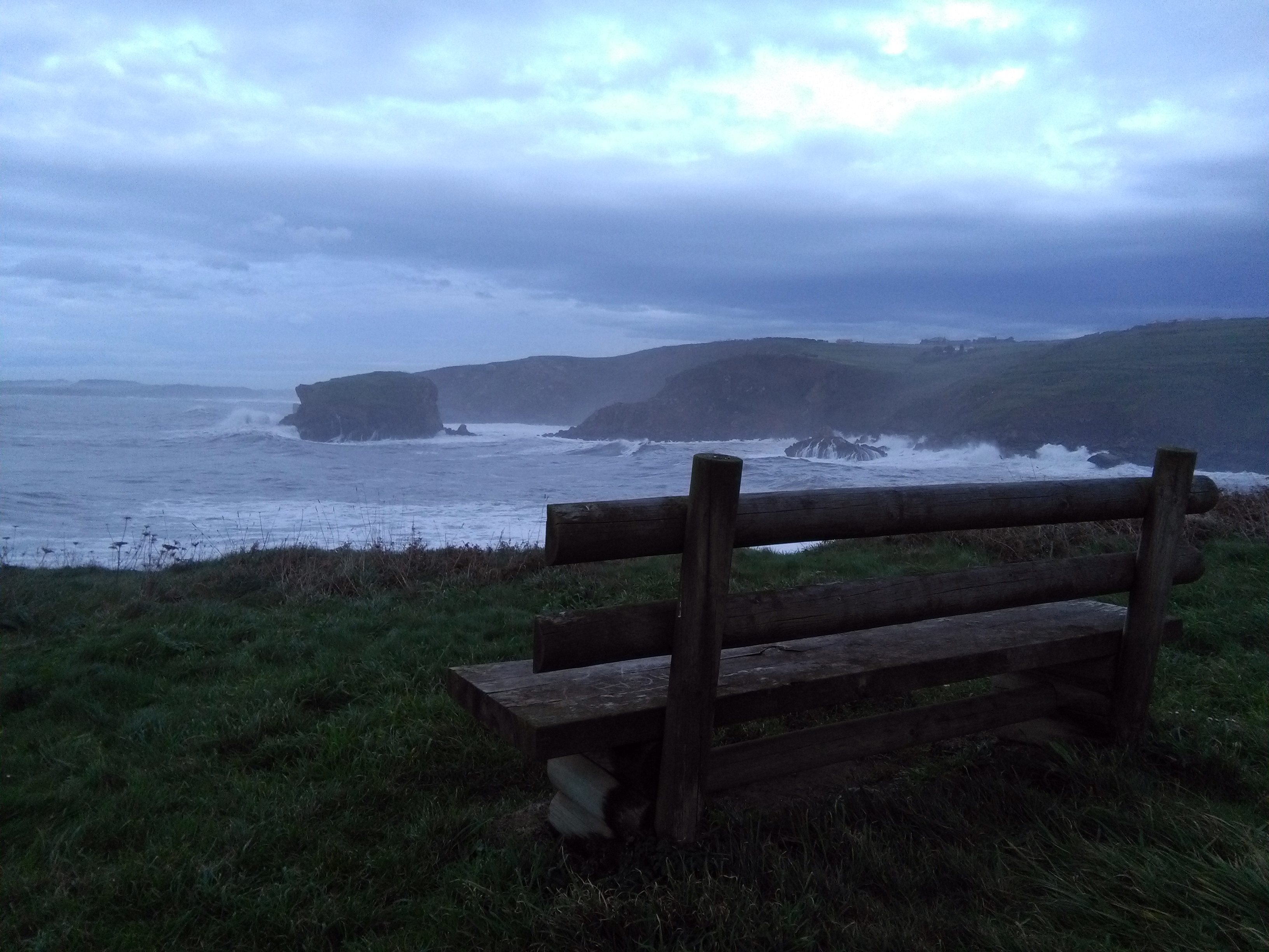 Senda de Raíces Nuevo, Castrillón, Asturias